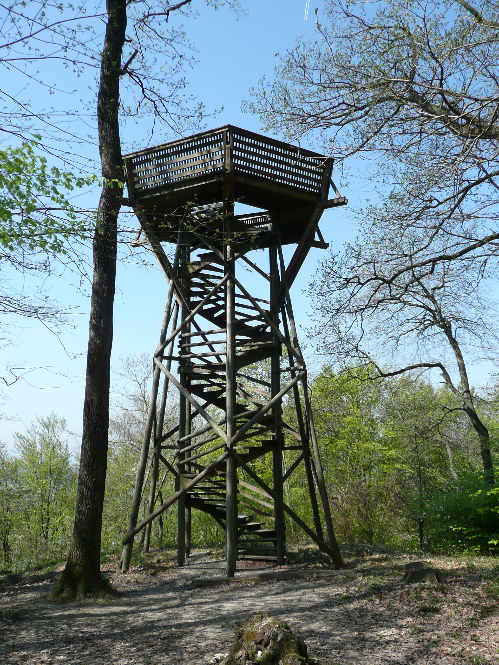 Aussichtsturm "Vorderhütten" auf dem Stammerberg, oberhalb des Stammertals bei Ober- und Unterstammheim im Kanton Zürich.